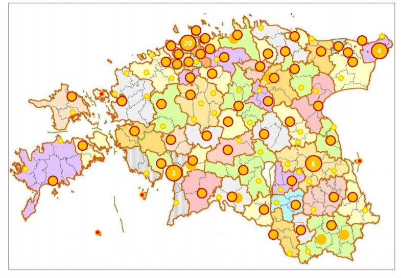 ETTK asukohad, filiaalid ja teenuspiirkonnad